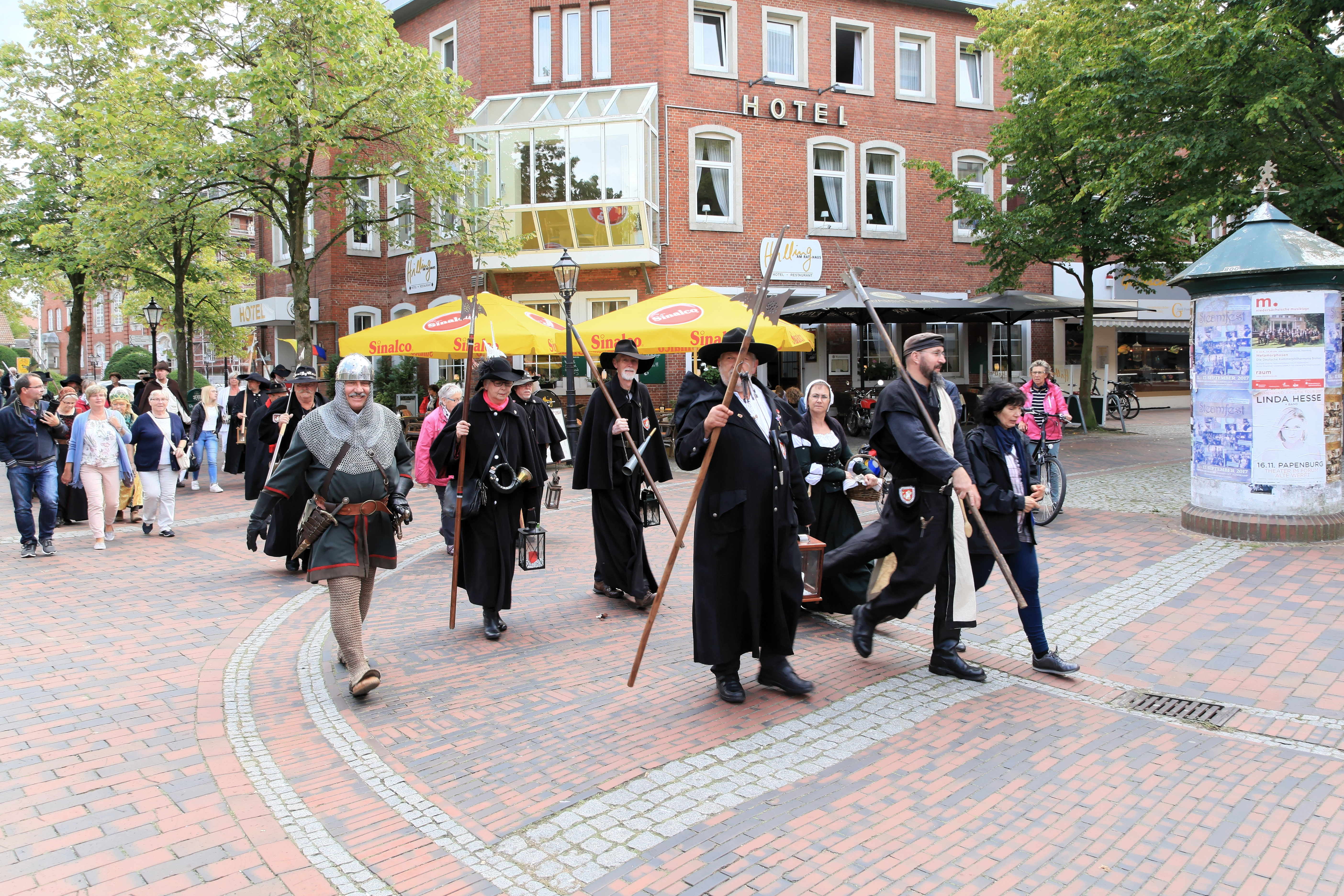 Treffen von ca. 50 Nachtwächtern auf dem Mittelaltermarkt 2017, Hauptkanal links und rechts am Untenende in Papenburg